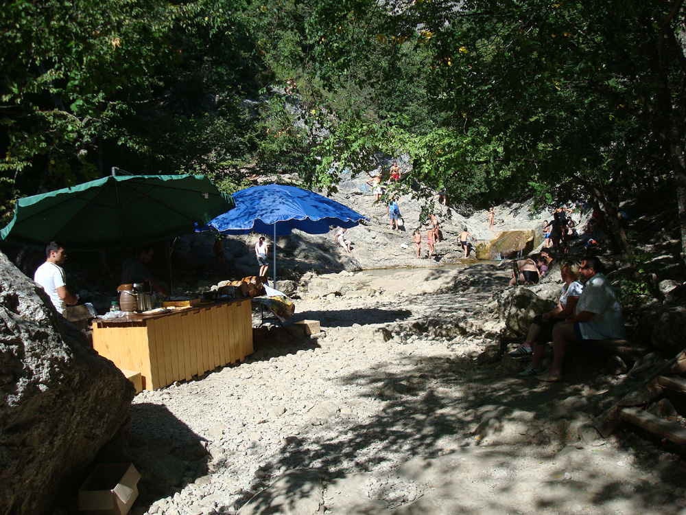 Современное положение дел в заказнике "Большой каньон Крыма"